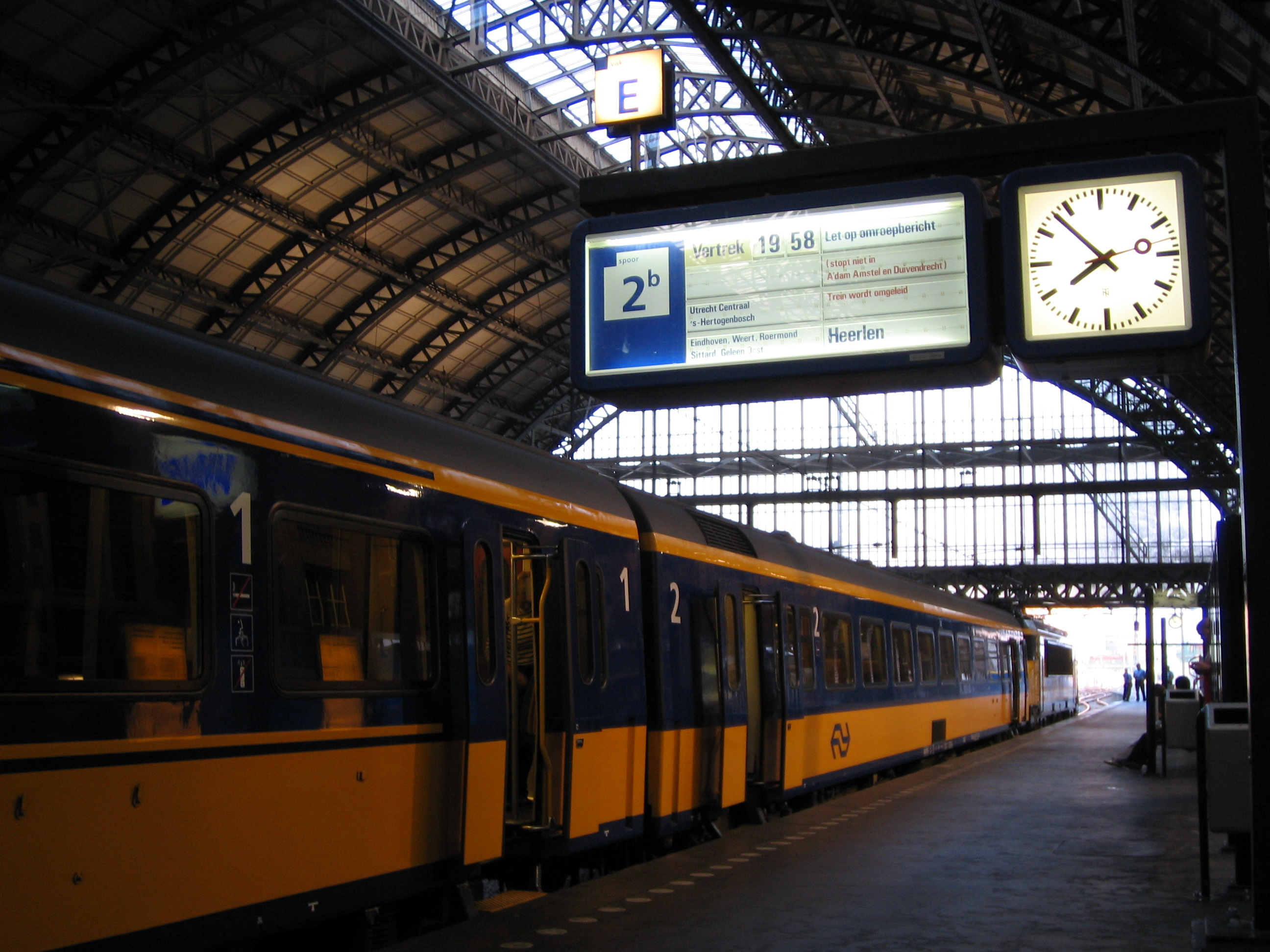 Trein